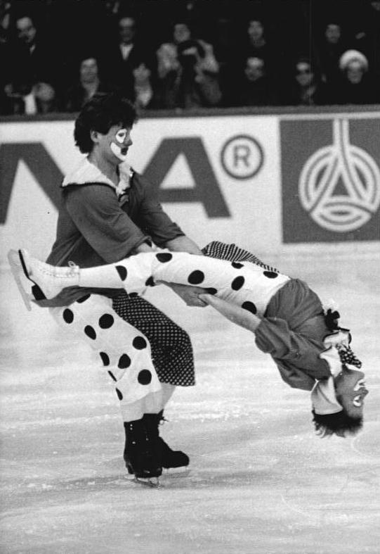 Sabine Baeß, Tassilo Thierbach ADN-ZB Thieme 29.3.83 Karl-Marx-Stadt: ISU-Schaulauf-Tournee- Mit lustigen Clown-Kostümen traten die Europameister und Vize-Weltmeister Sabine Baess - Tassilo Thierbach vom einheimischen Sportklub bei der Schaulauf-Veranstaltung am 28.3. in der Eissporthalle der Bezirksstadt auf.